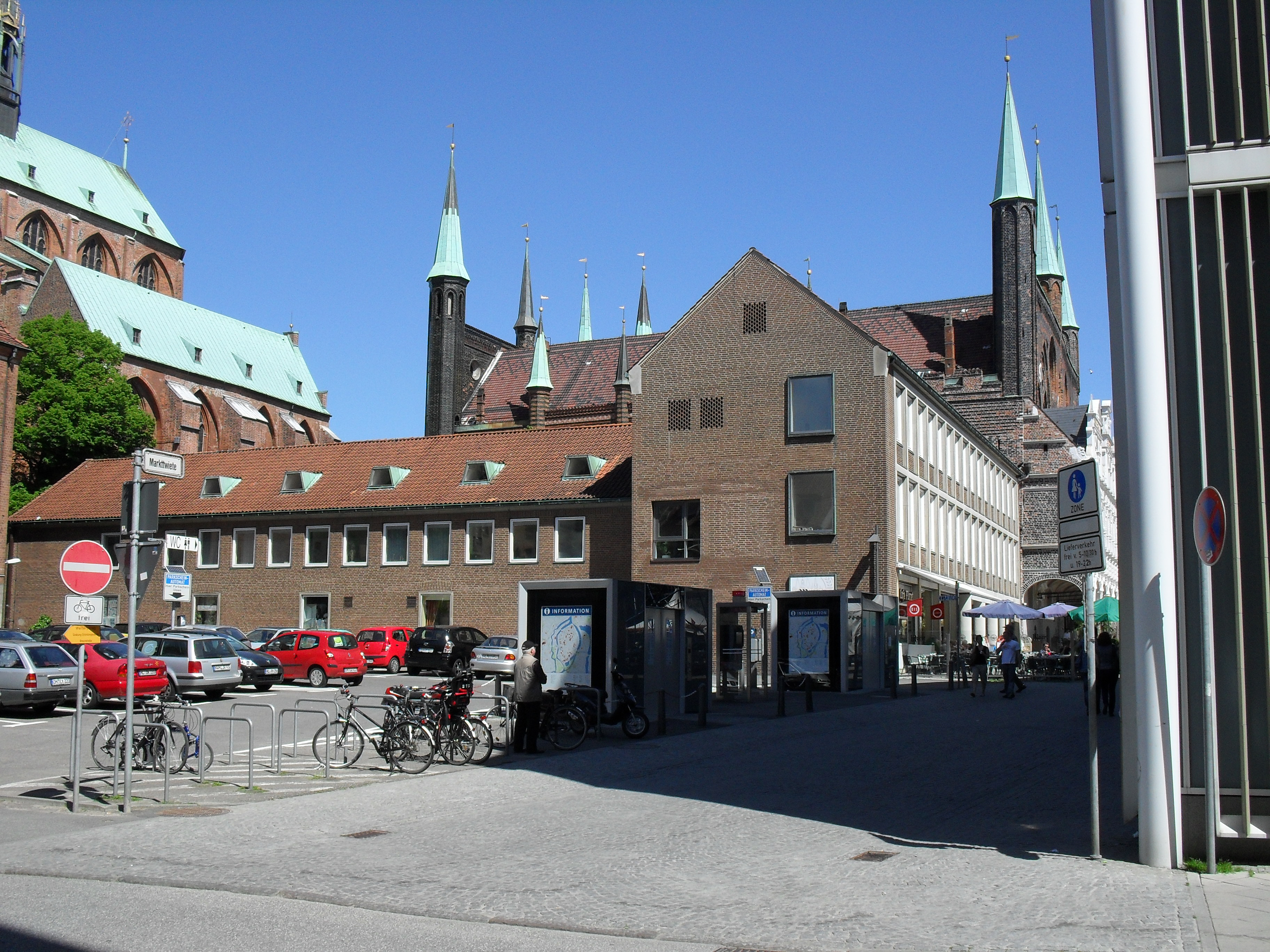 Die Markttwiete in Lübeck